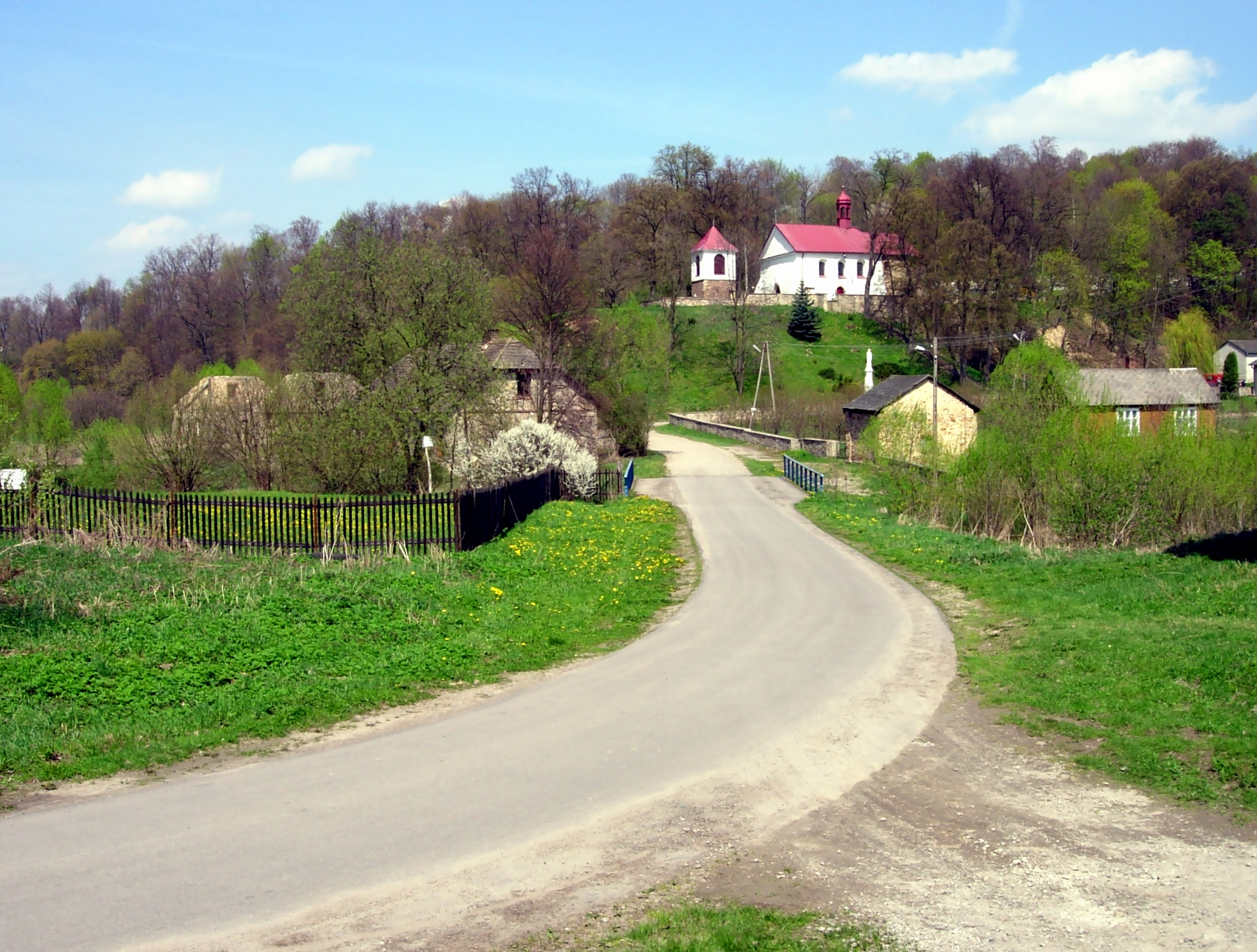 Grzegorzowice w województwie świętokrzyskim